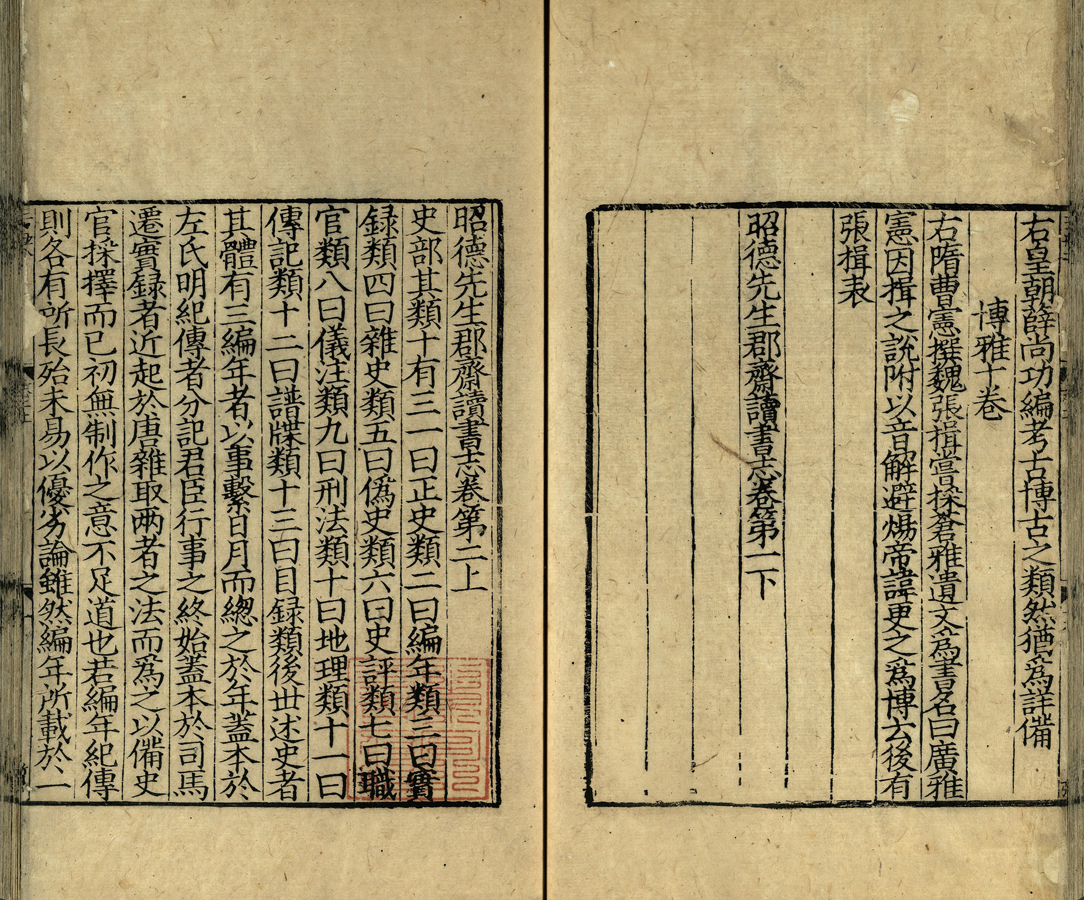 四卷後志二卷附志二卷